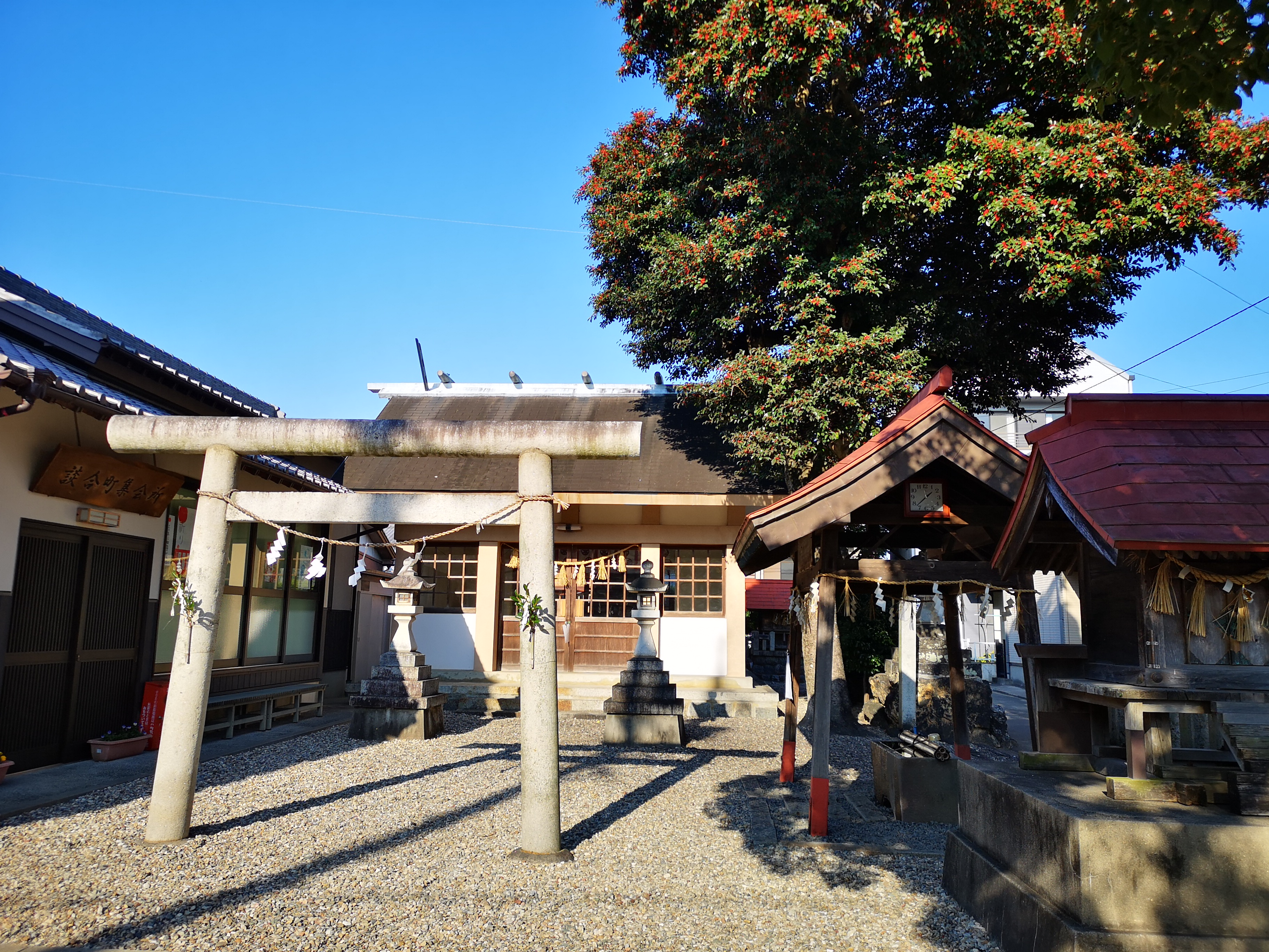 愛知県豊橋市談合町に所在する談合神社。豊橋鬼祭の御旅所となる。